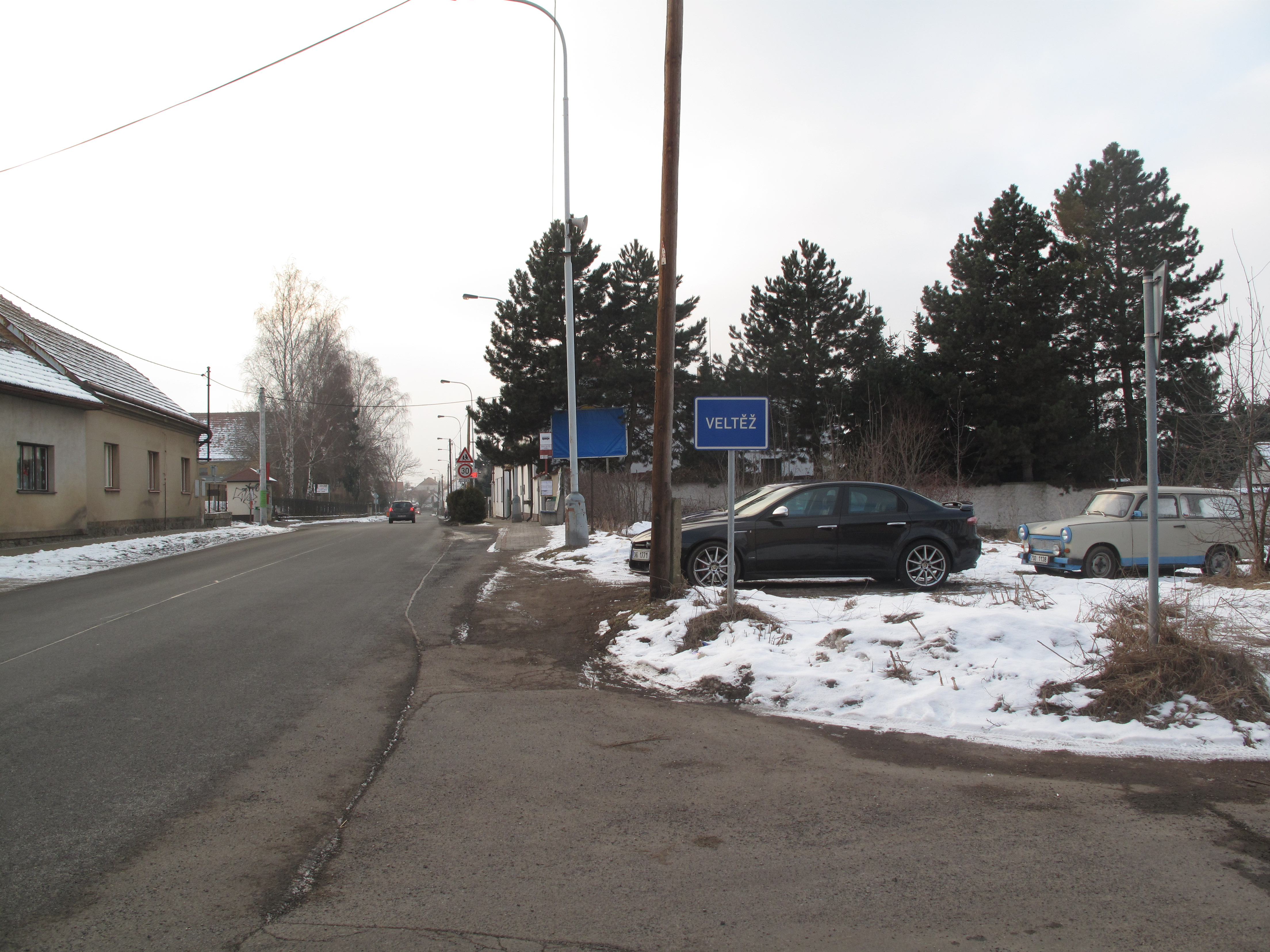 Veltěž